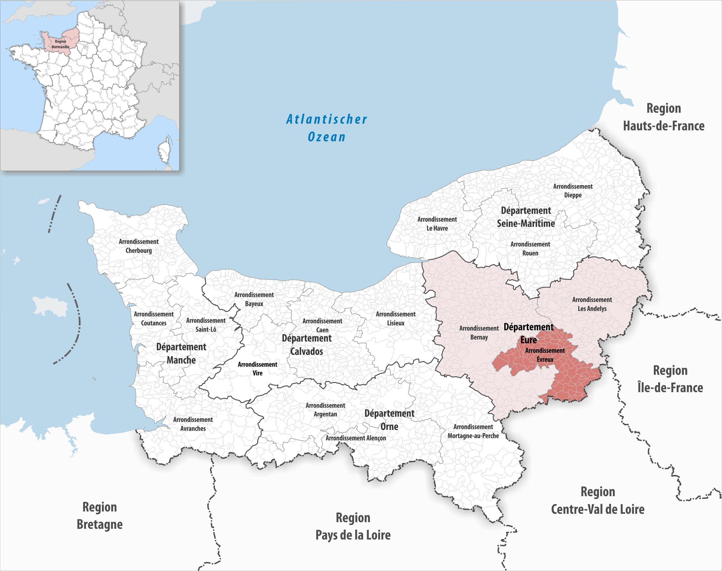 Lage des Arrondissements Évreux